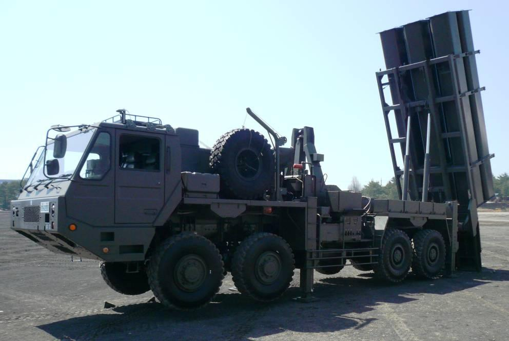 １２式地対艦誘導弾 ○諸元等（誘導弾） [全長]5.00m [全幅]0.35m [重量]700kg [有効射程]百数十ｋｍ [製作]三菱重工業 88式地対艦誘導弾の後継として、方面特科部隊に装備し、対上陸戦闘に際して侵攻部隊の揚陸に先立ち洋上の艦船を撃破するために使用する。88式地 対艦誘導弾に比べ、射程が延伸しているほか射撃効率及び残存性が向上している。 海岸に面した山の背後から発射すると、あらかじめプログラミングされたコースにしたがって山腹を迂回、洋上に出て低高度で飛翔し目標に命中するとい う、日本独自のアイデアが生かされている。